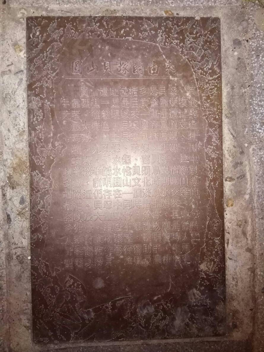 臺北市圓山捷運站外往淡水方向，原兒童育樂中心外人行道